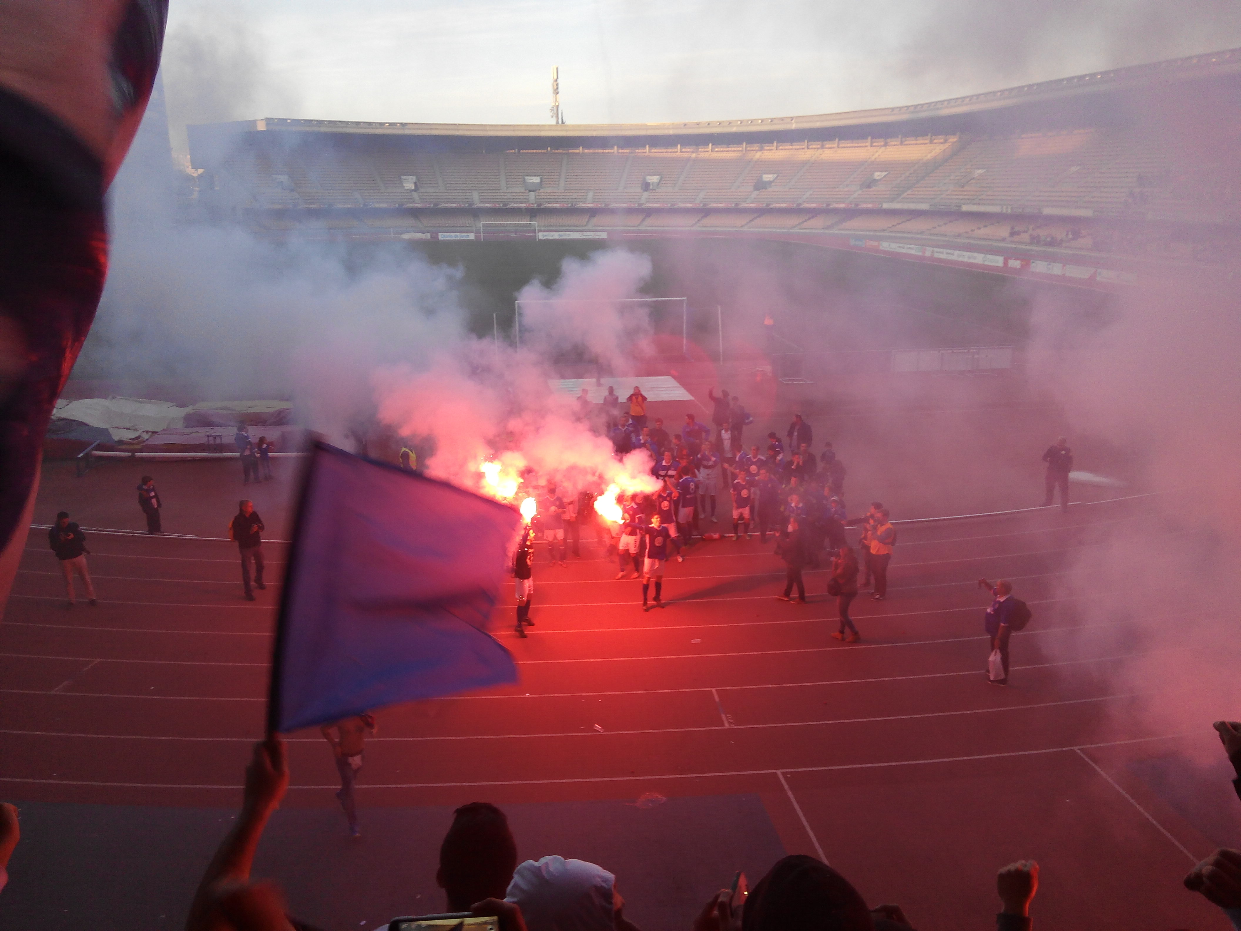 Ascenso del Xerez a 2º Andaluza